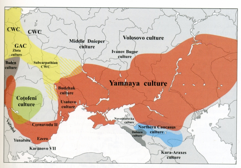 Индоевропейцы, ямная культура.